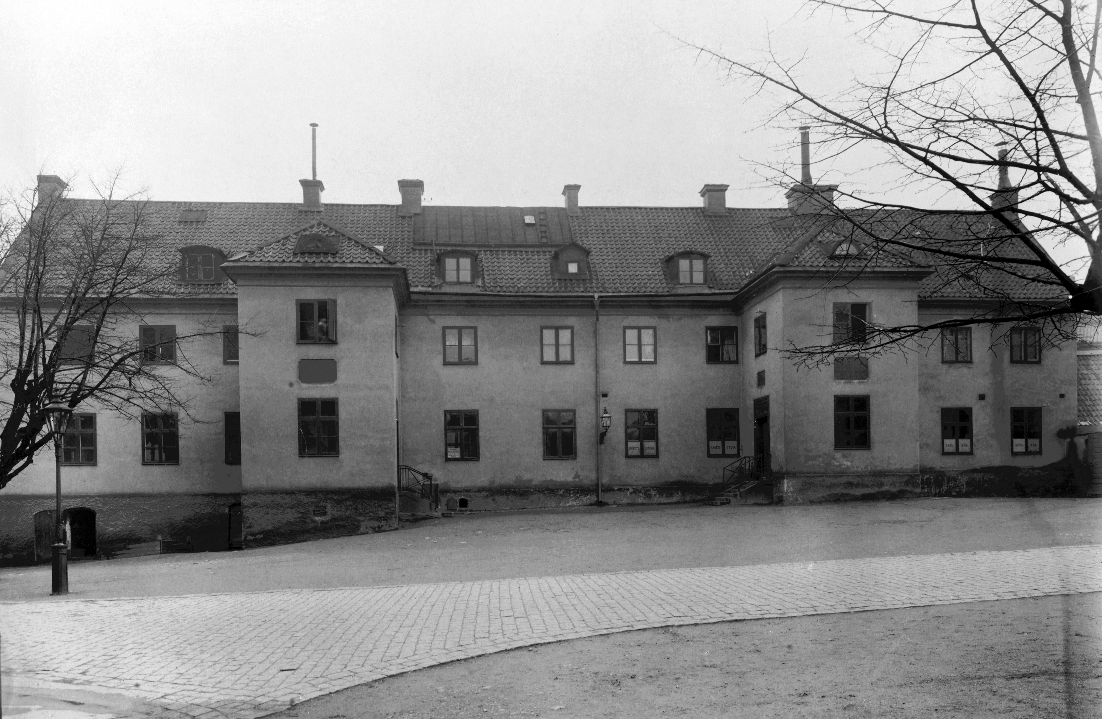 Klara gamla skola. Fasad in mot Klara kyrkogård